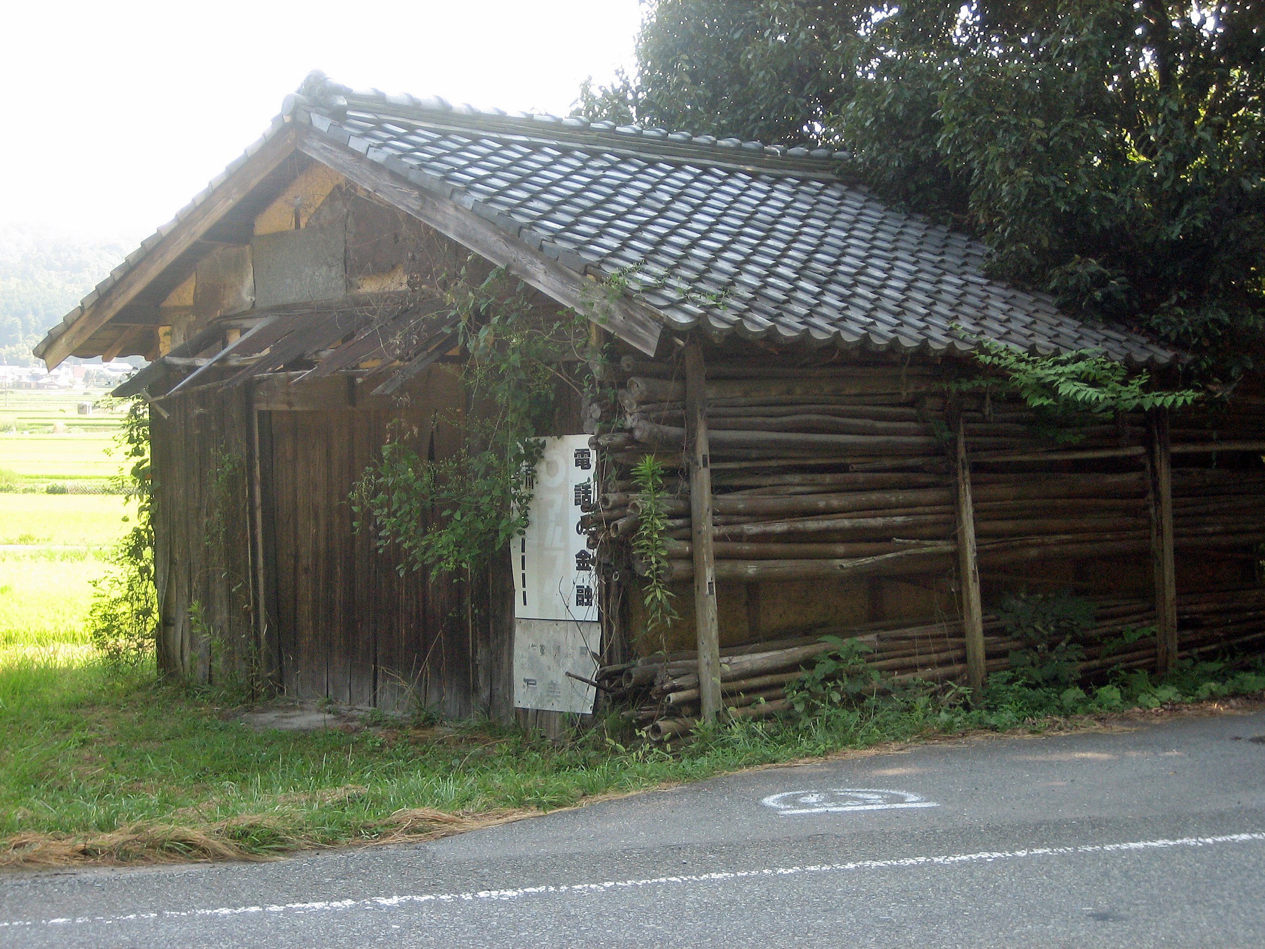 国道372号沿いおよび近辺にあるさまざまな建物など。 日本にある古い木造の小屋。これは納屋とも呼ばれている農耕用の建築物である。